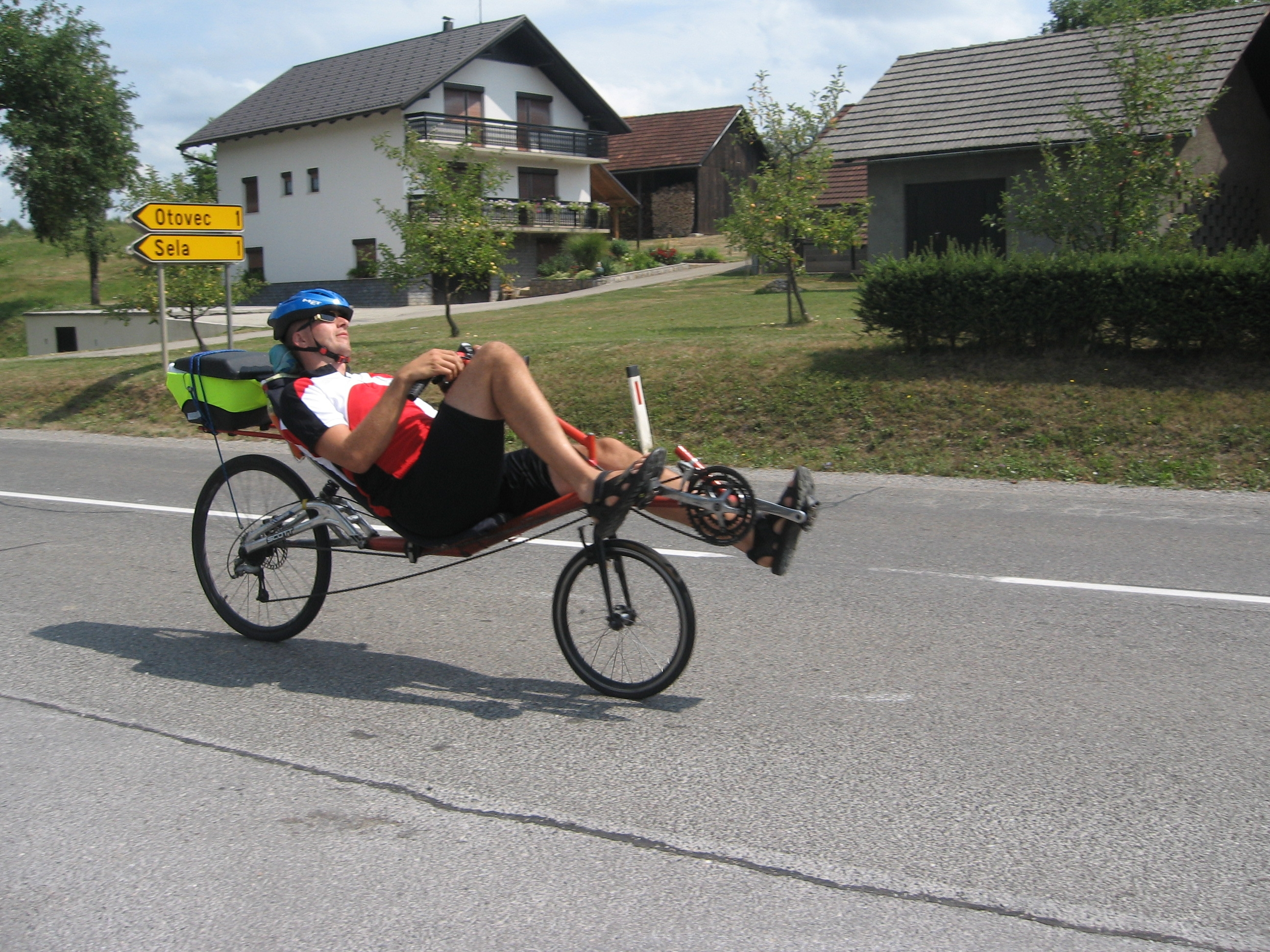 Lezikolo - Recumbent bicycle